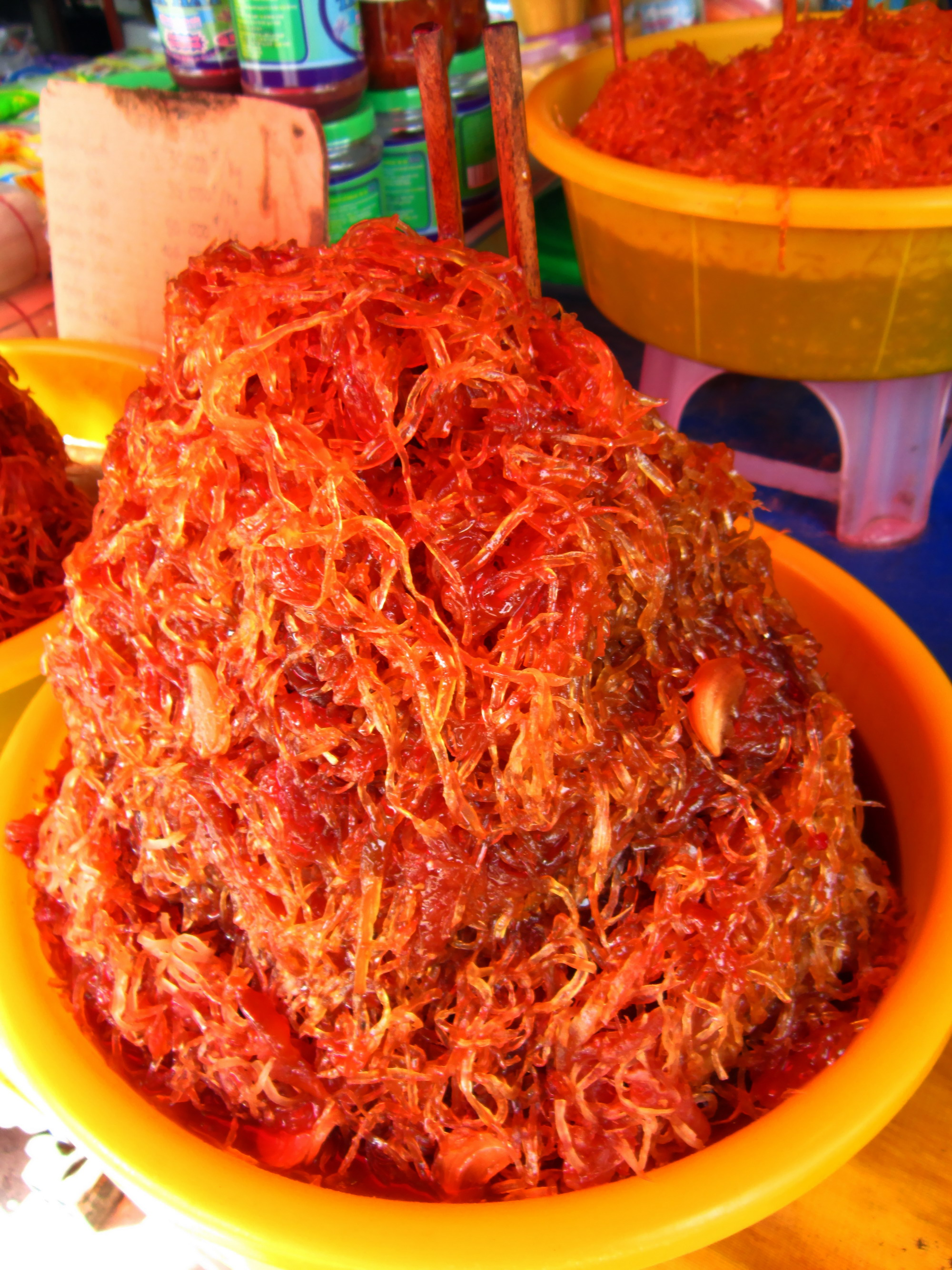 Mắm thái được bày bán nhiều ở Châu Đốc, An Giang, Việt Nam.